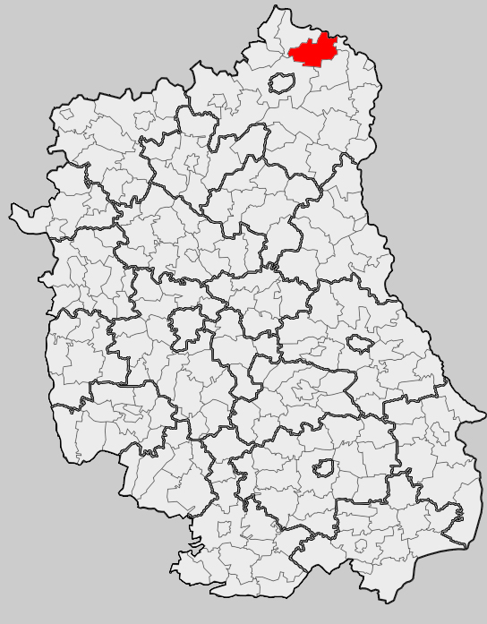 Map of gmina Rokitno, Biała Podlaska county, Lublin voivodship Mapa gminy Rokitno, powiat bialski, województwo lubelskie